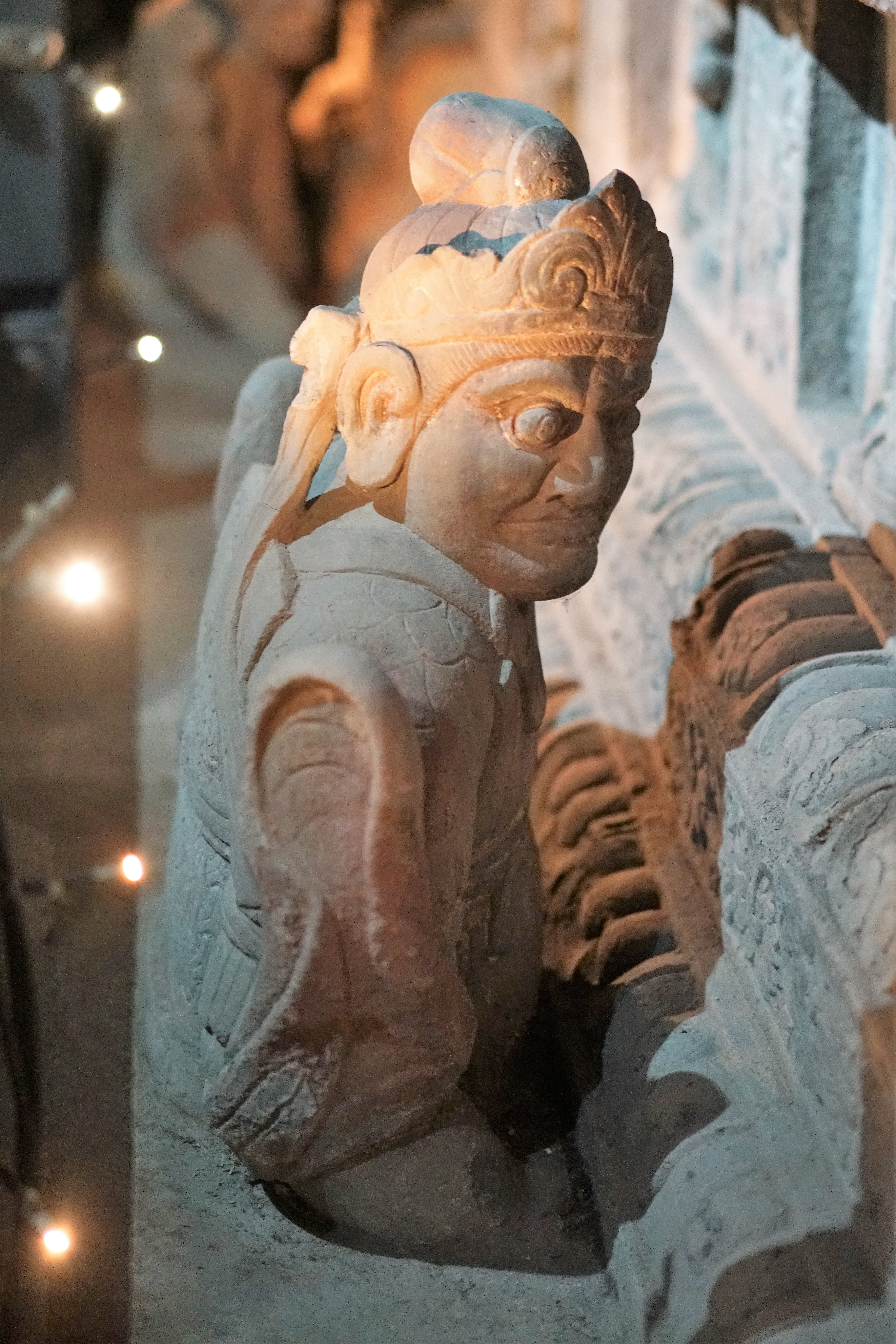 中文（中国大陆）: 十二力士 永陵